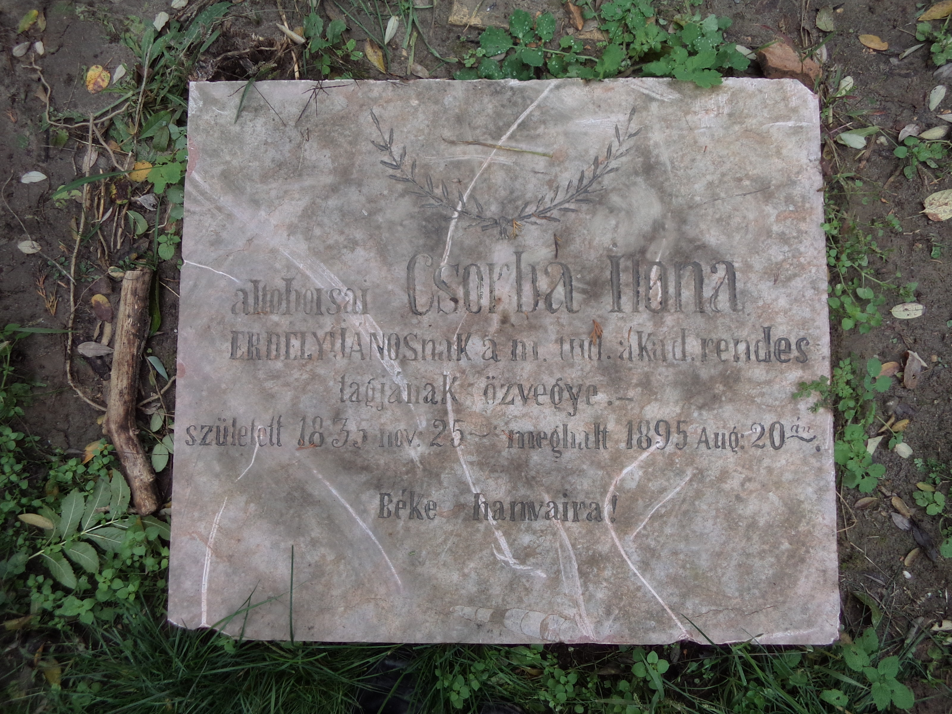 Csorba Ilona eltávolított sírköve a komáromi református temetőben